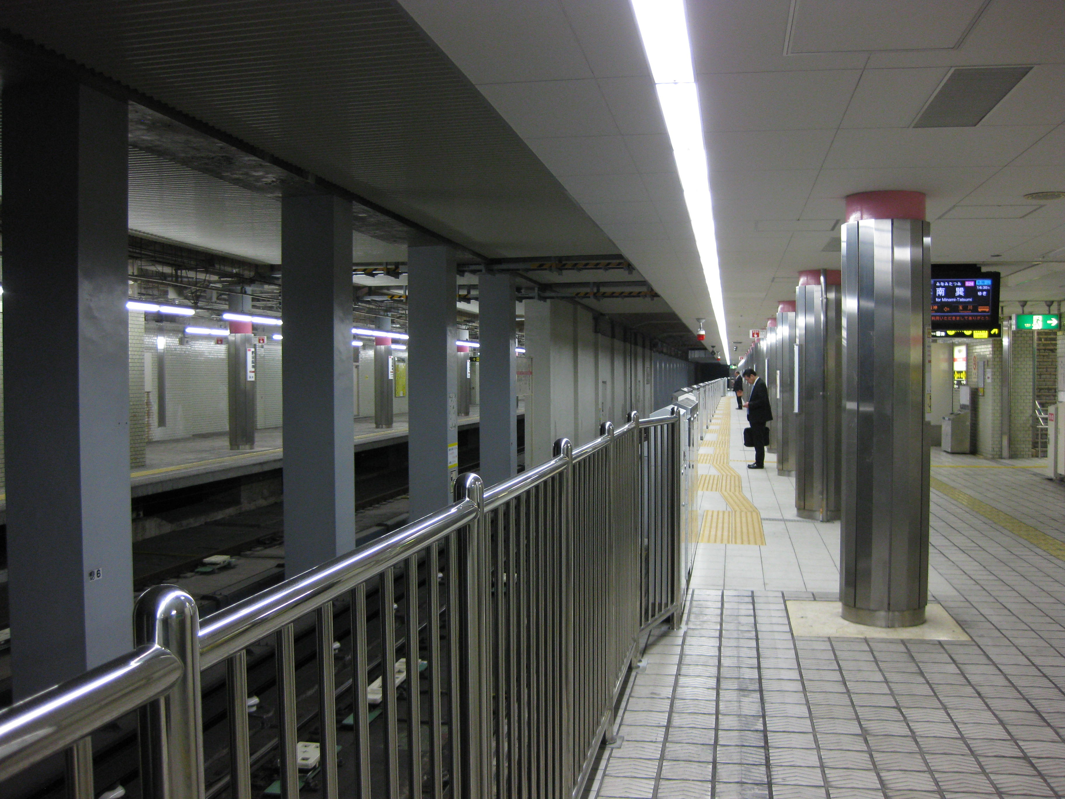 野田阪神駅プラットホーム